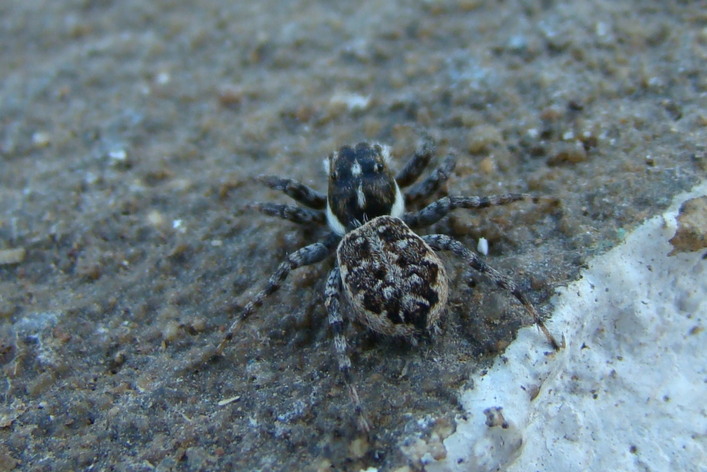 Aranha (Menemerus semilimbatus) - fêmea ou juvenil //\ Spider - young or female